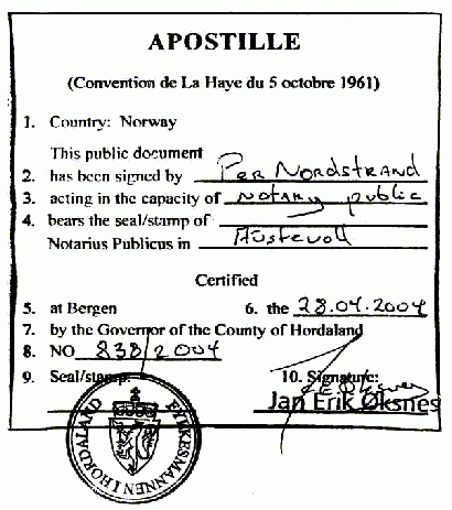 Апостиль (Норвегия)